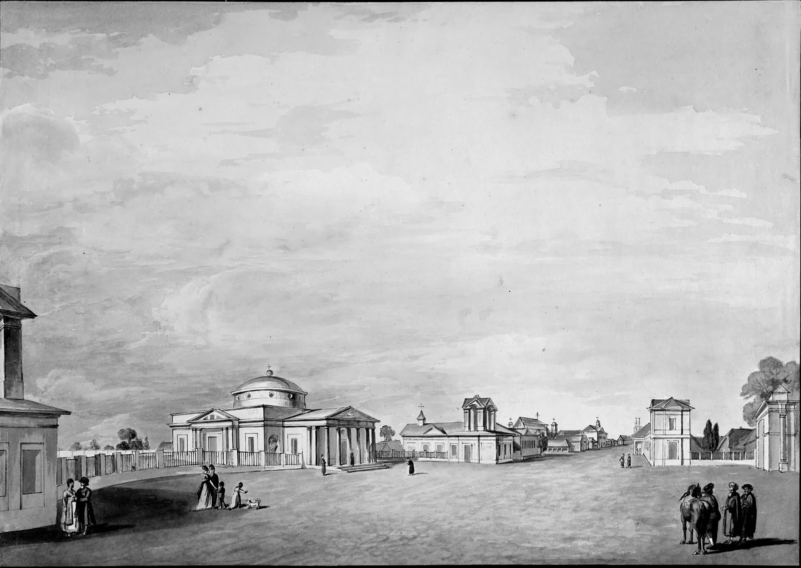 Беларуская (тарашкевіца): Магілёў (Mahiloŭ), пляц Саборны (plac Saborny). Царква Сьвятога Ёсіфа